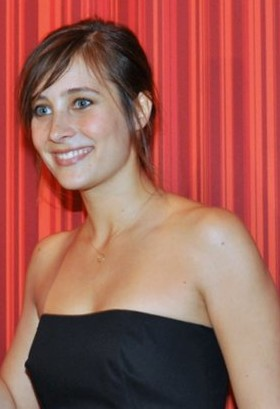 Julie de Bona à la cérémonie des étoiles d'or du cinéma français